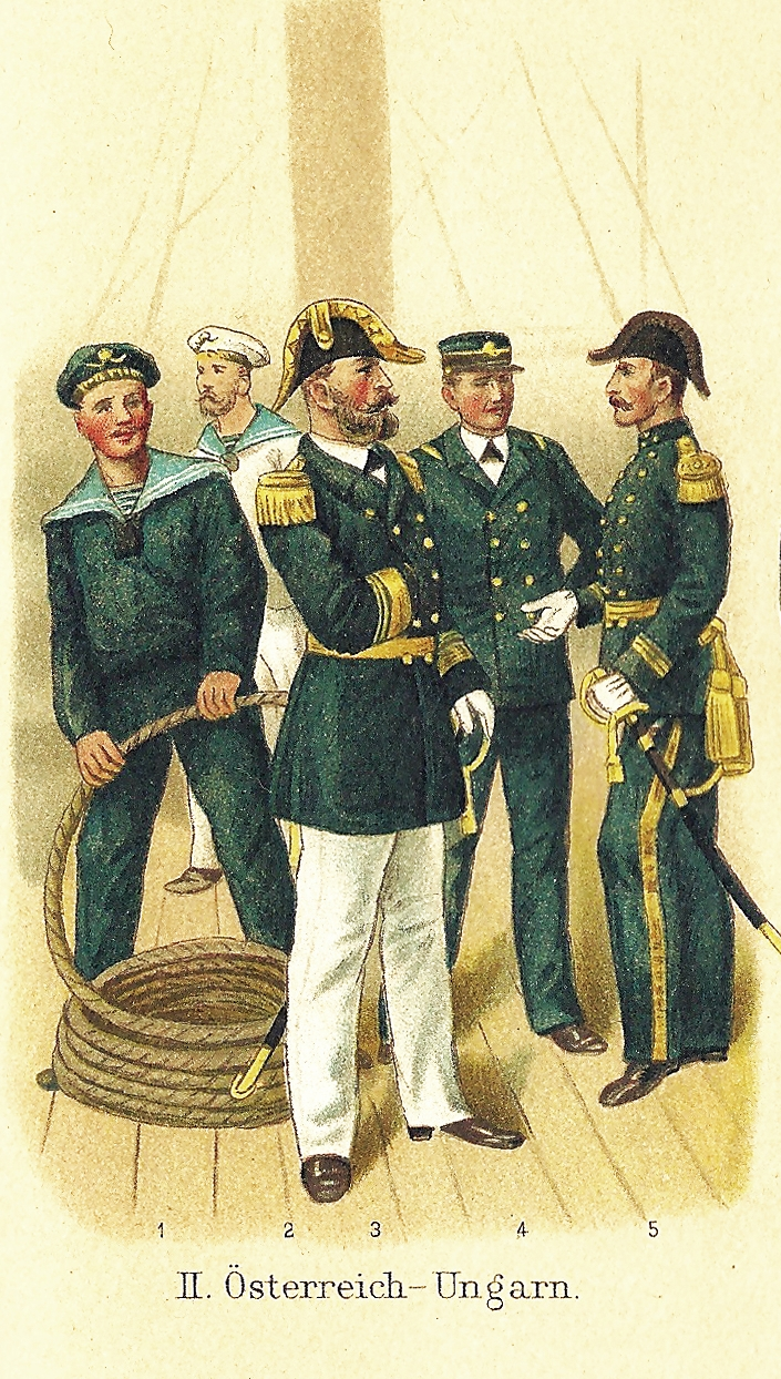 Uniformen der "Marine-, Schutz- und Kolonialtruppen" europäischer Staaten Ende des 19. Jahrhunderts, Beilage zum Artikel "Marine" Matrose in blauem Anzug Matrose in weißem Anzug Fregattenkapitän (großer Dienstanzug) Seeoffizier in kleiner Uniform Seeoffizier in Gala-Uniform